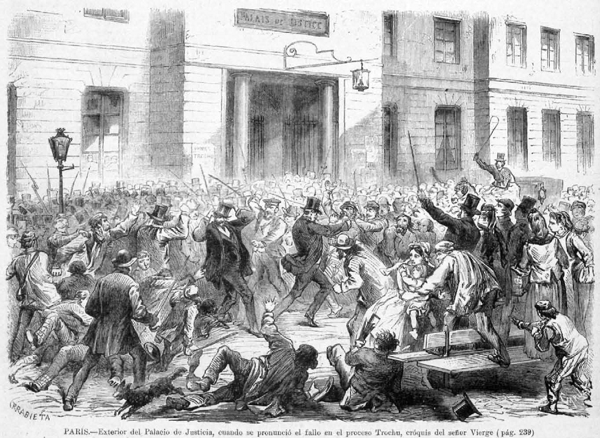 París, exterior del Palacio de Justicia, cuando se pronunció el fallo en el proceso Trochu, en la revista La Ilustración Española y Americana.